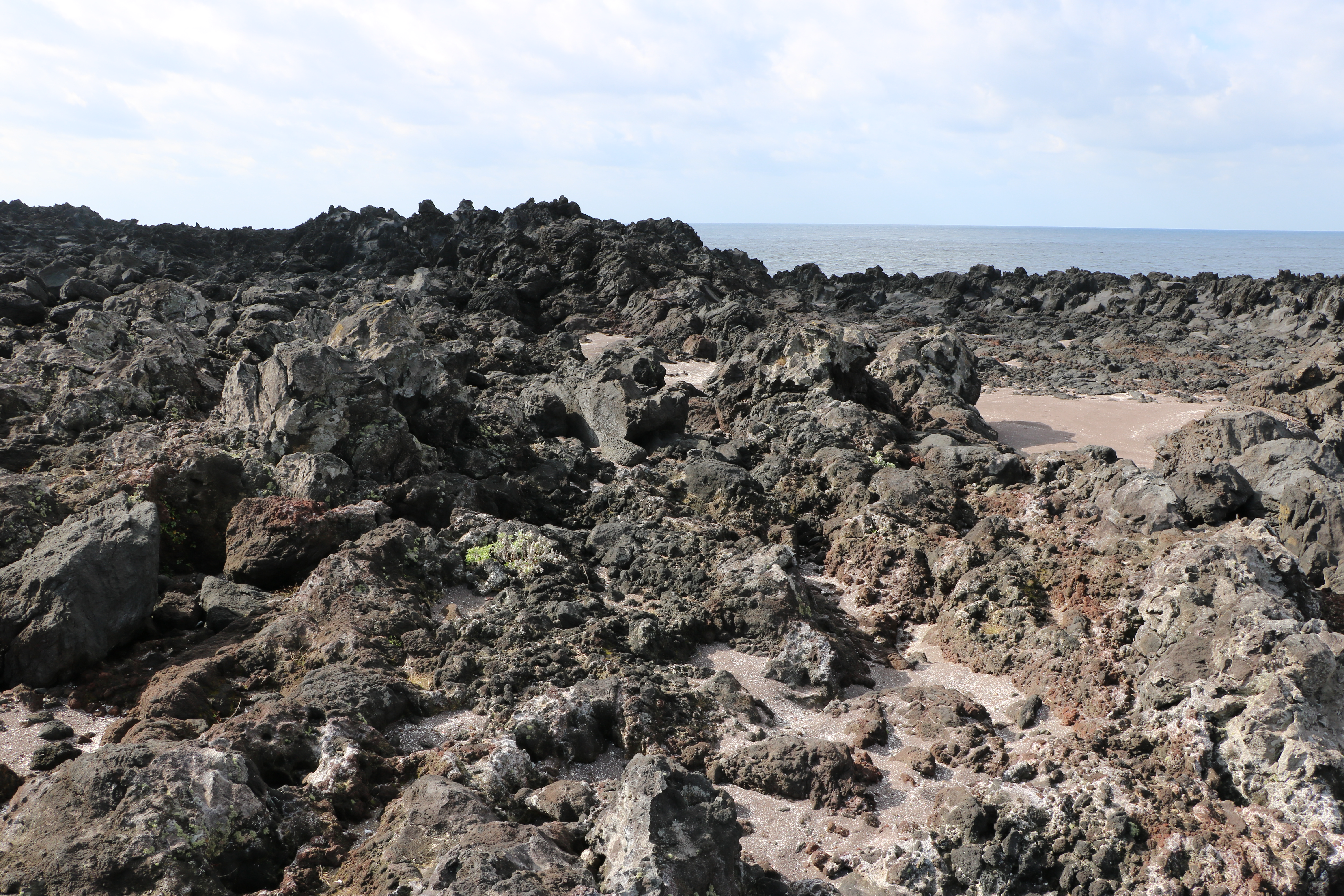 八丈小島鳥打地区海岸沿いの熔岩地帯（東京都八丈町）